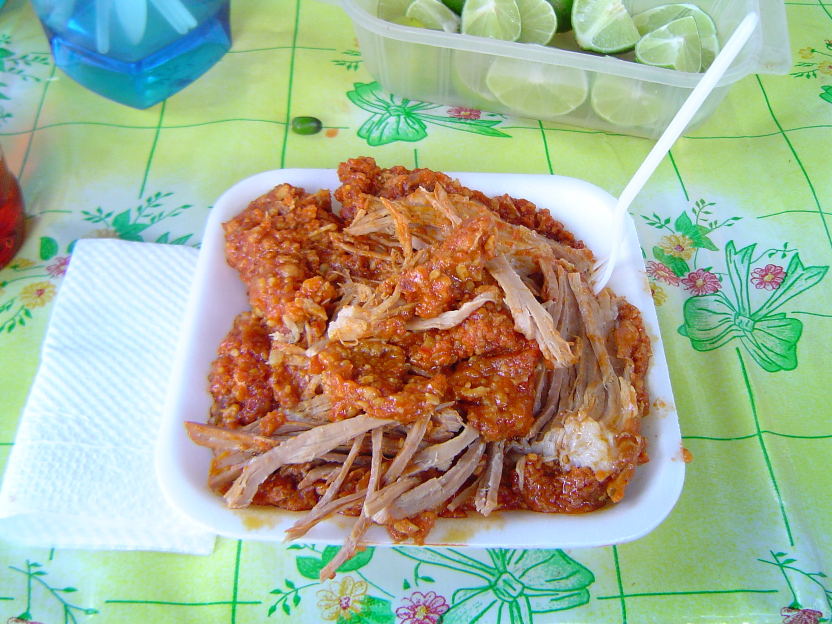 Zacahuil, en stor tamal